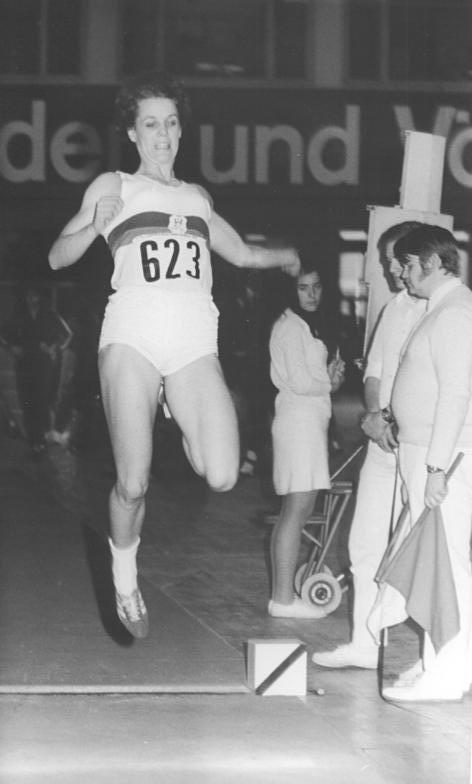 Angela Schmalfeld ADN-ZB Katschorowski - Weitsprung. Bei den Hallenwettkämpfen am 27.1.74 in der Berliner Dynamo-Sporthalle erreichte die 22jährige Angela Schmalfeld (SC Magdeburg) 6,52 m, die neue Bestleistung für die Dynamo-Sporthalle bedeuten.